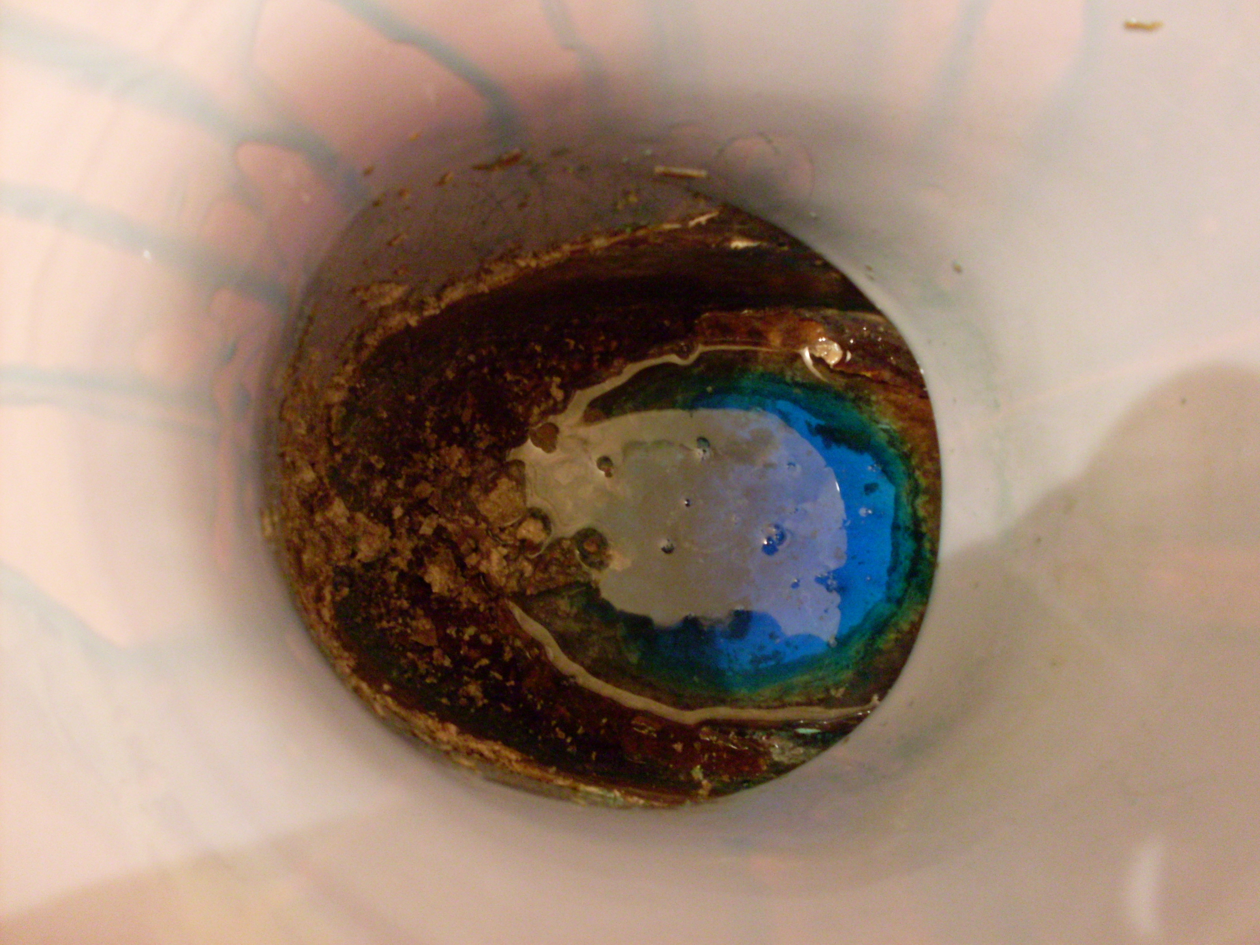 mehrjährige Schicht von Urinstein in einer Toilette.